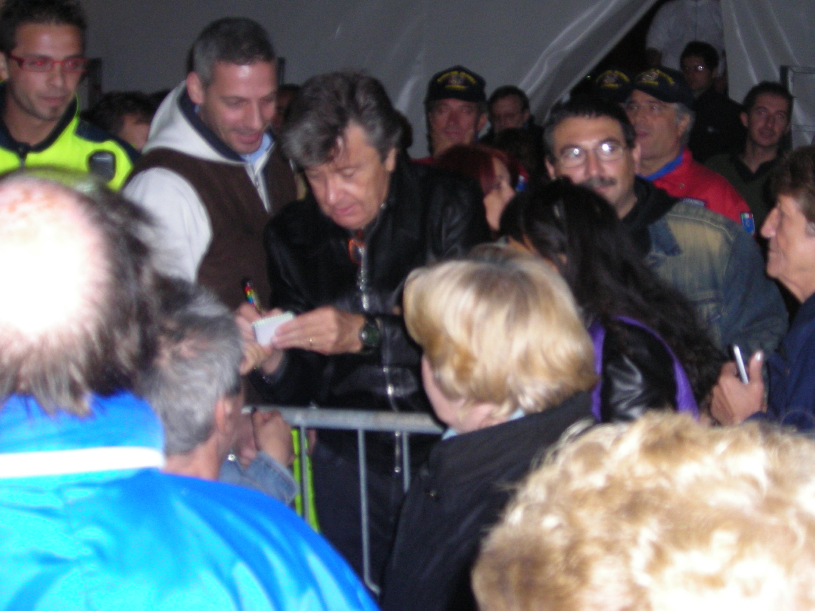 Bobby Solo signe des autographes à Nichelino le 28 septembre 2008